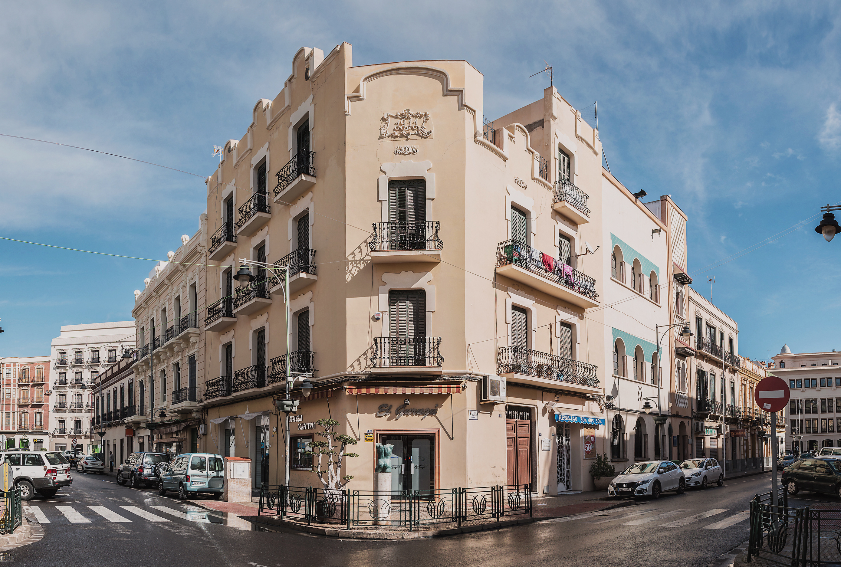 La Casa de Manuel Buxedas Aupi es un edificio estilo modernista de la ciudad española de Melilla situado en la calle General Pareja, 3 y forma parte del Conjunto Histórico Artístico de la Ciudad de Melilla, un Bien de Interés Cultural.